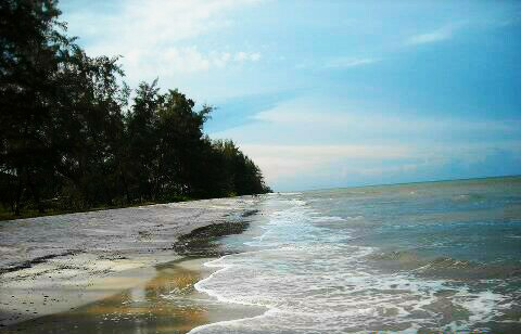 Lokasi Desa Sungai Cingam Kecamatan Rupat Selatan. (Pantai saat Kondisi Air Pasang Naik)